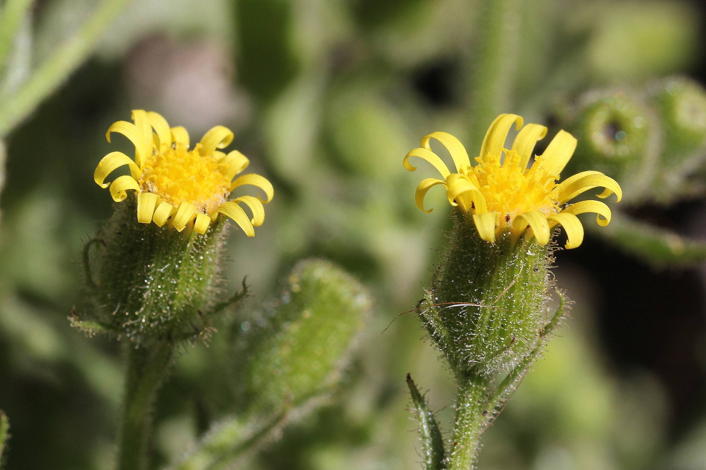 Senecio viscosus